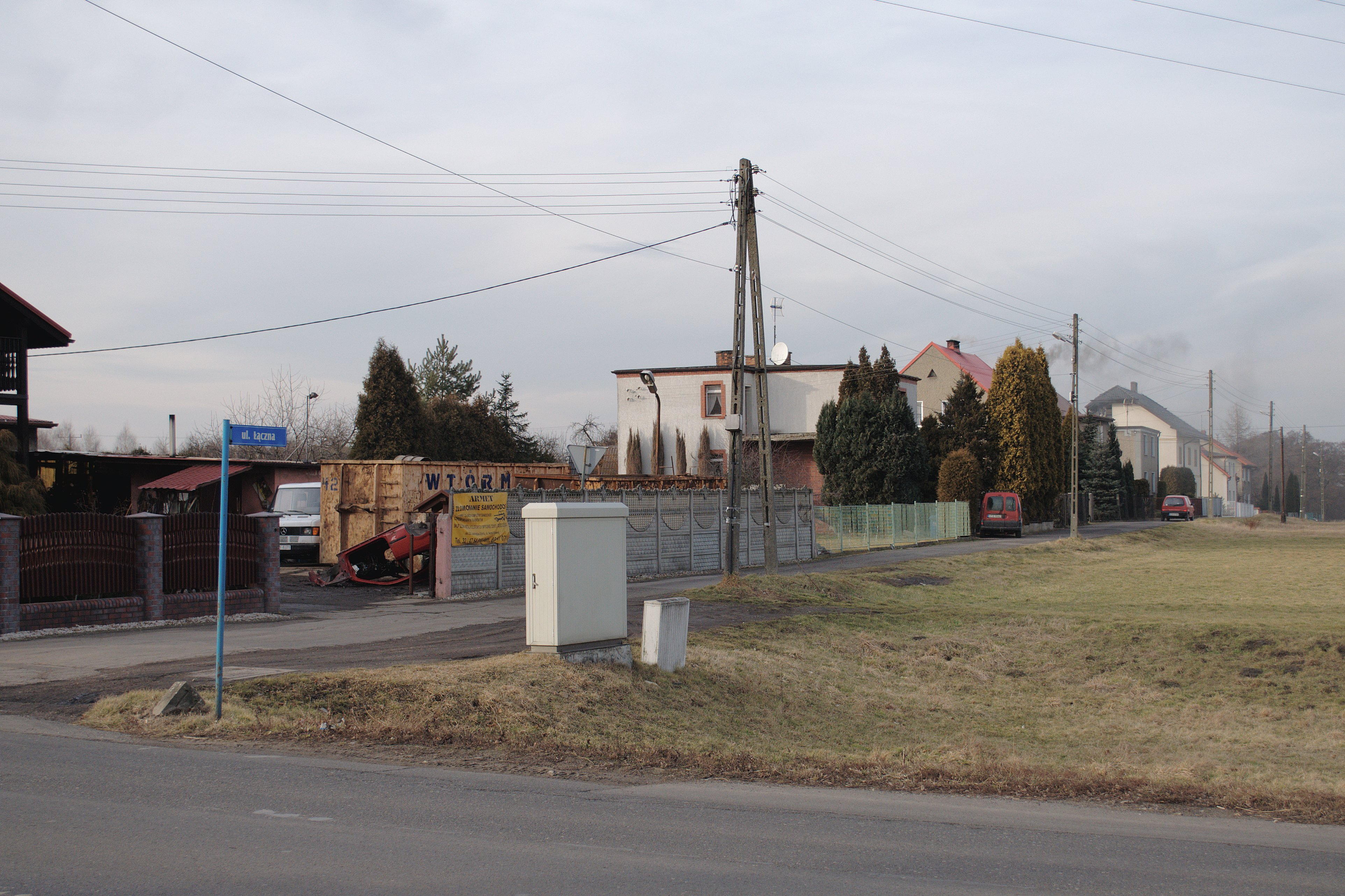 Przezchlebie. Ulica Łączna.